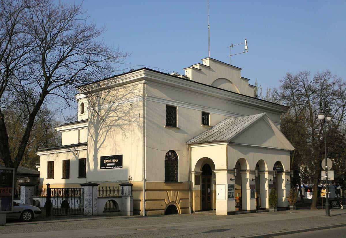 Budynek dawnej łaźni miejskiej, widok z ul.Żeromskiego.